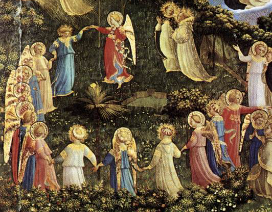 Last Judgement (detail) Tempera on wood